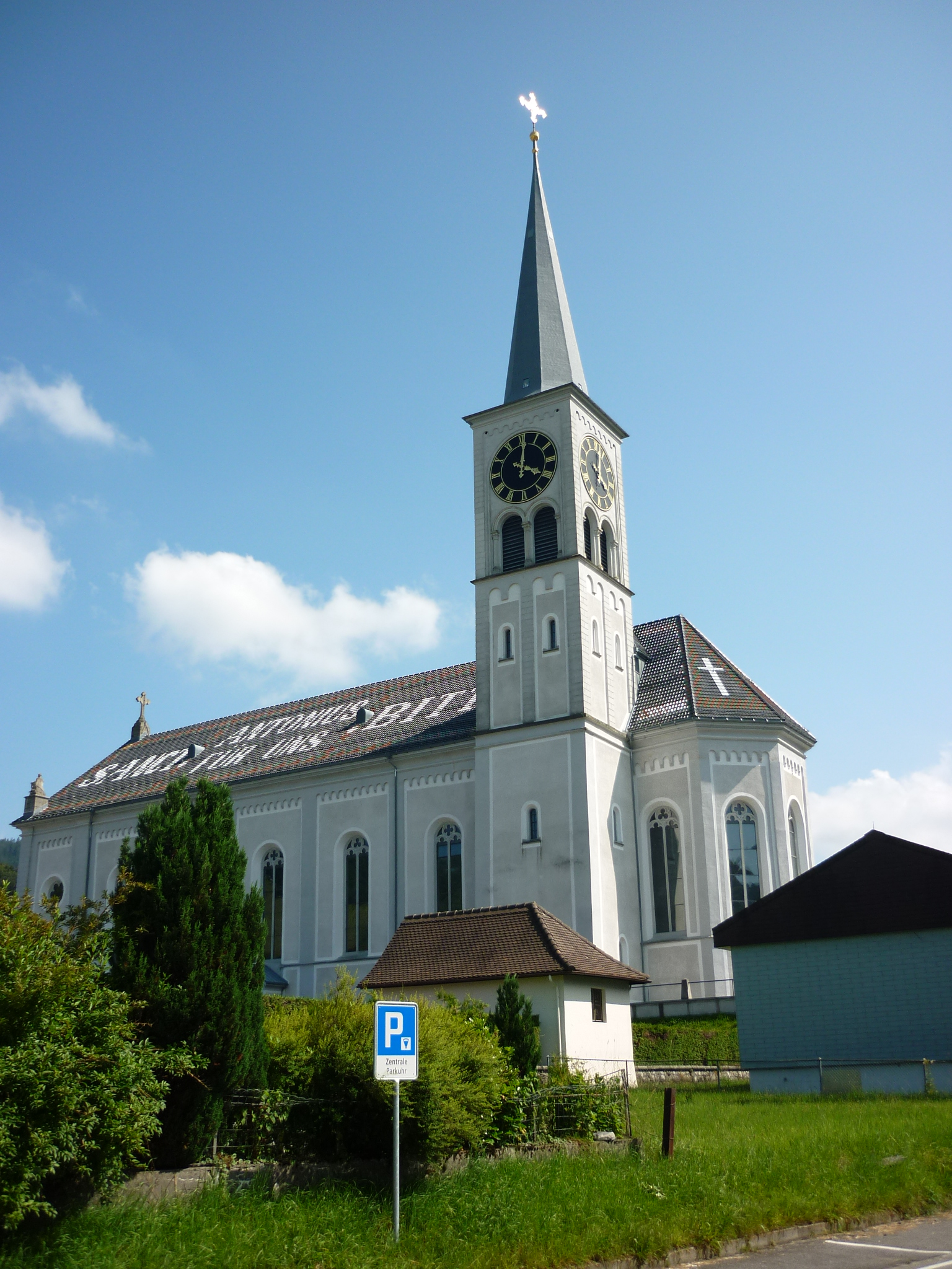 Kirche Rothenthurm SZ, Schweiz